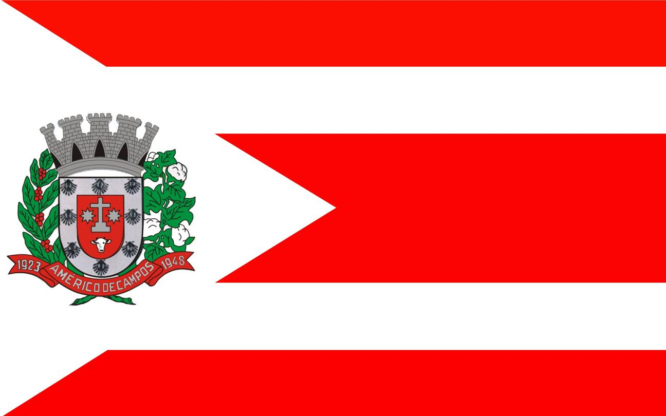 Bandeira do Município de Américo de Campos, Estado de São Paulo, Brasil